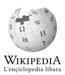 Logo di vec.wikipedia in versione 2.0